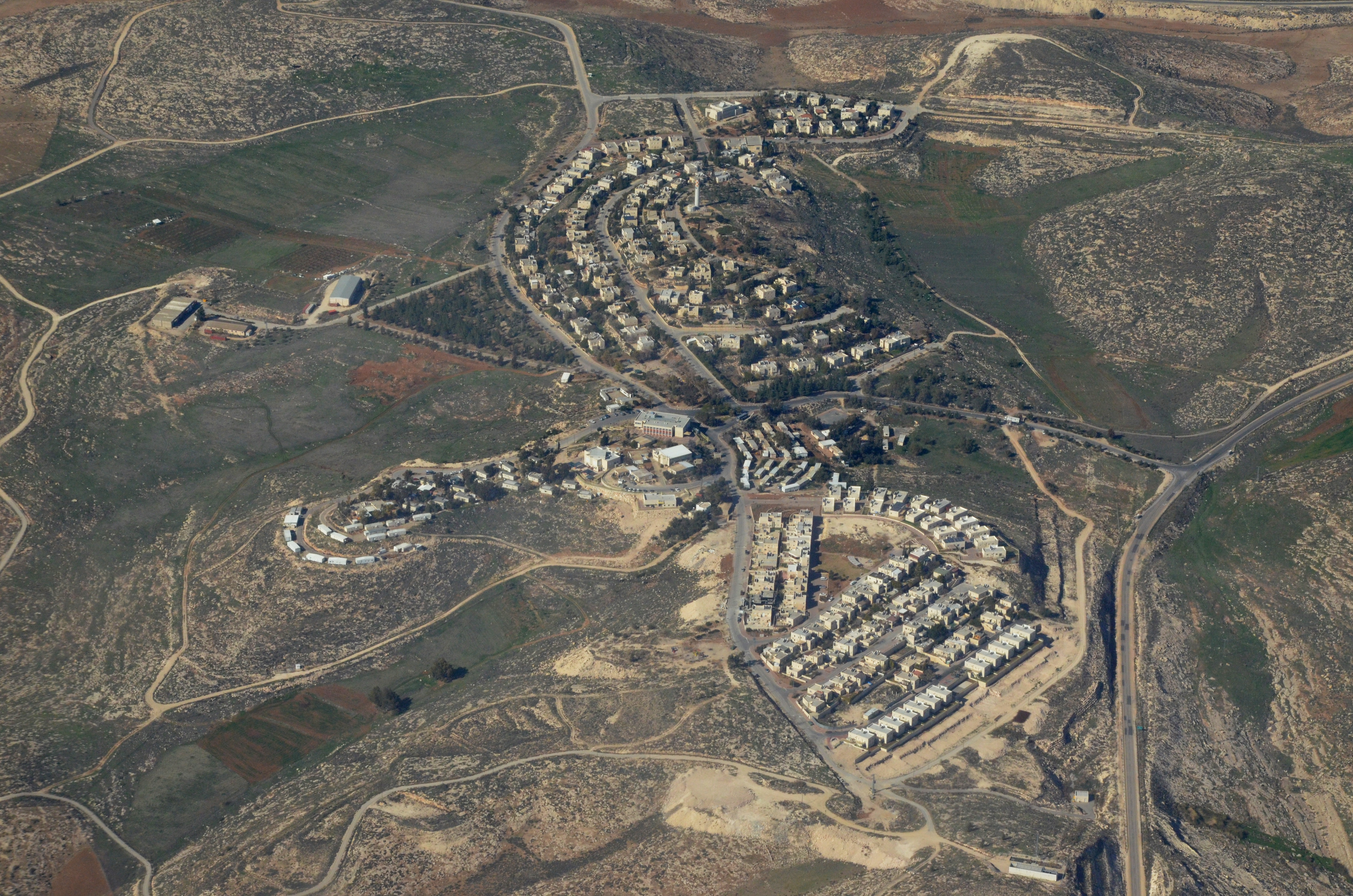 מעלה מכמש